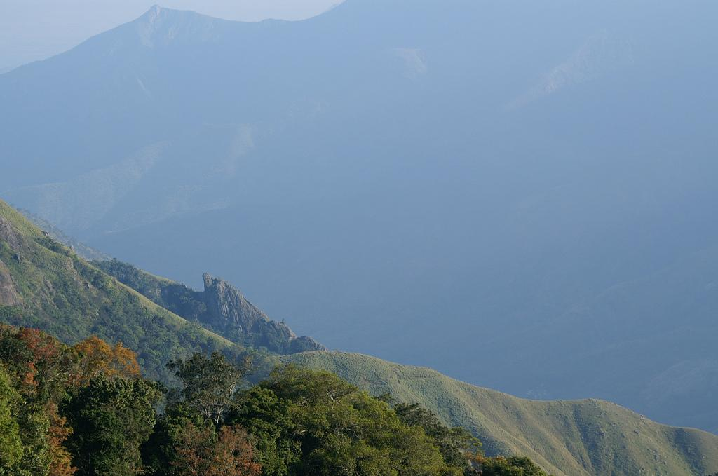 Ambukuthi mala